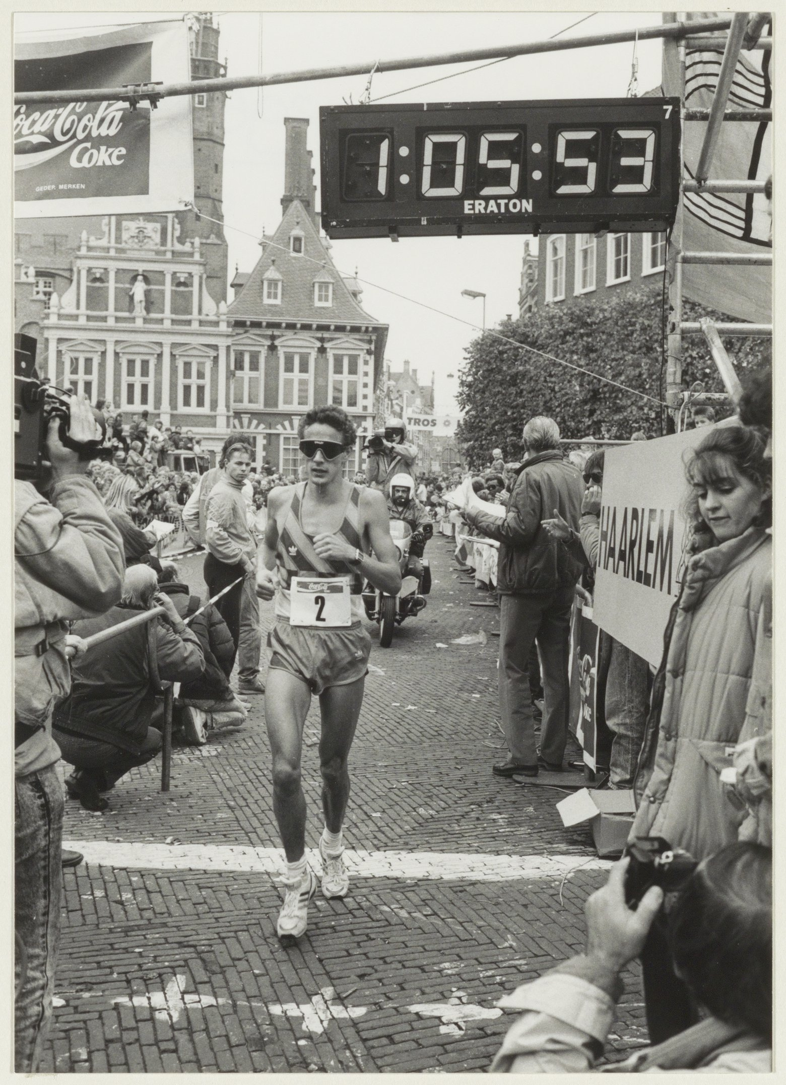 CollectieCollectie Fotoburo de BoerInventarisnummerNL-HlmNHA_54023711NL-HlmNHA_1478_29685k4aBeschrijvingAankomst op de Grote Markt van John Vermeule, winnaar van de 4e TROS-loop.FotonummerNL-HlmNHA_1478_1407DocumenttypeHistorieprenten, tekeningen en foto'sSoort vervaardigerFotograaf AnnotatiesC56-2HD.241088LandNederland ProvincieNoord-Holland GemeenteHaarlem PlaatsHaarlem StraatGrote Markt GeografischCentrum Begindatum10-1988Einddatum10-1988Datering gebeurtenis22-10-1988TechniekFoto TrefwoordenSport en recreatie